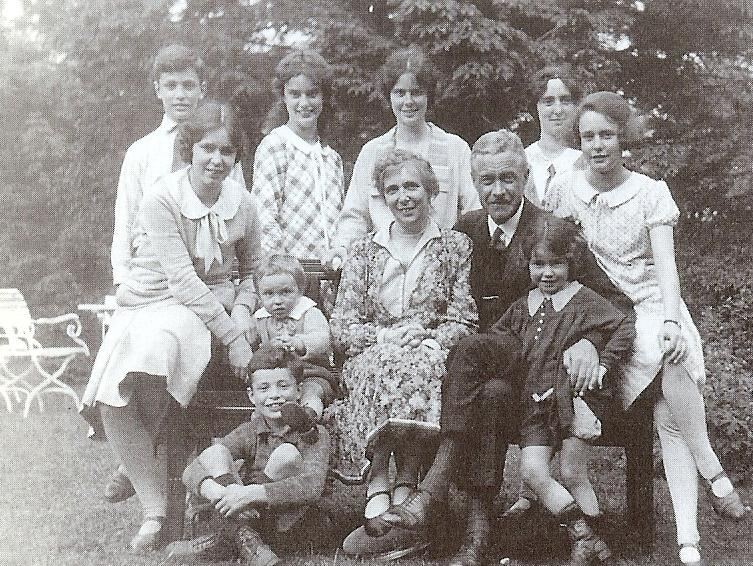 Familiefoto van schrijver Paul Biegel uit 1927, ter ere van het zilveren huwelijk van zijn ouders. Paul is de kleine jongen op de bank.